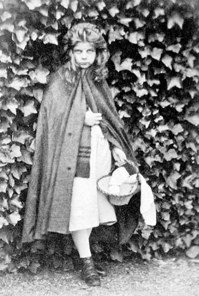 Lewis Carroll (Charles Lutwidge Dodgson). Album I. Little Red Riding-Hood. Princeton University Library. Z-PH-LCA-I.24